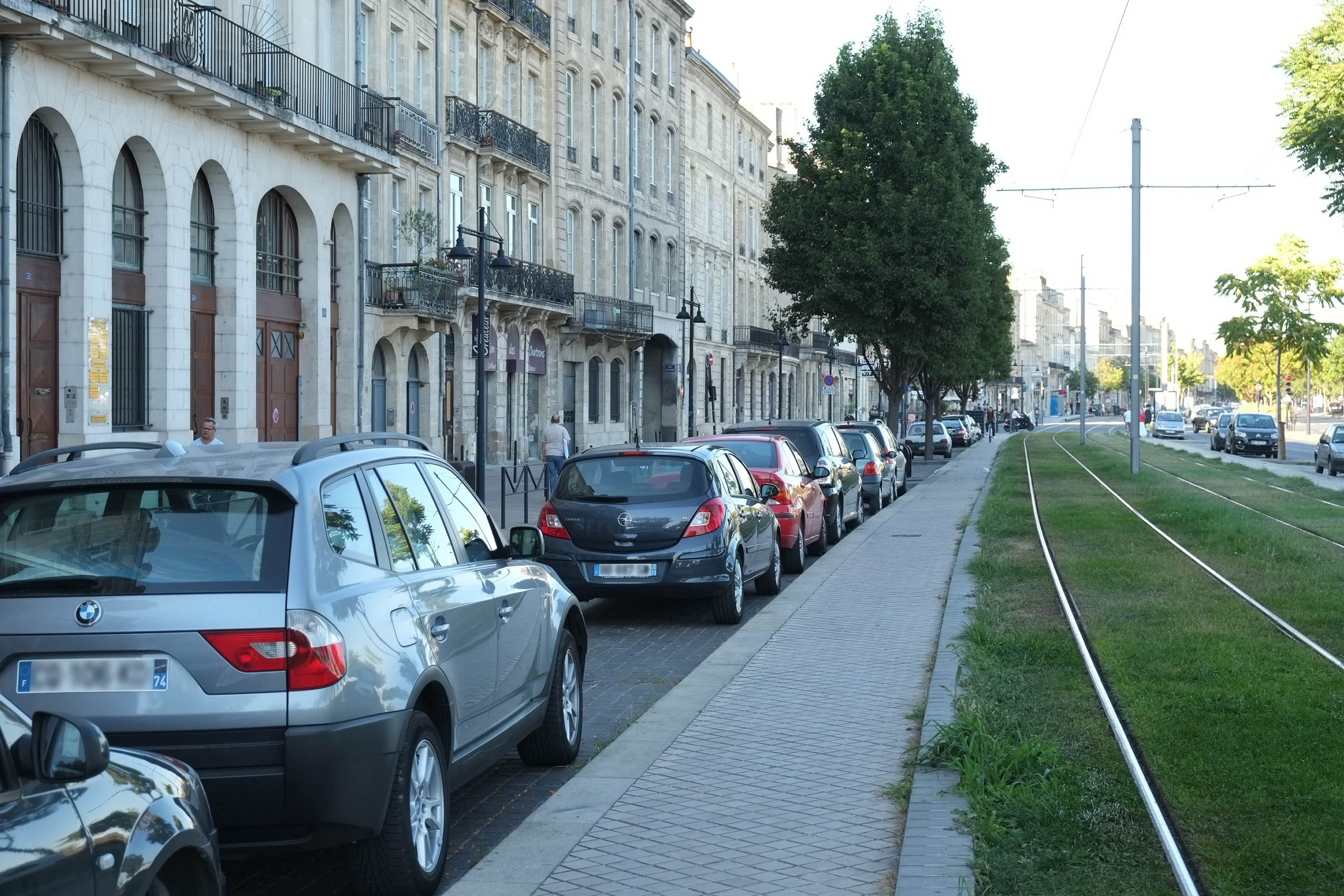 Ligne de tramway quai des Chartrons Bordeaux Gironde France